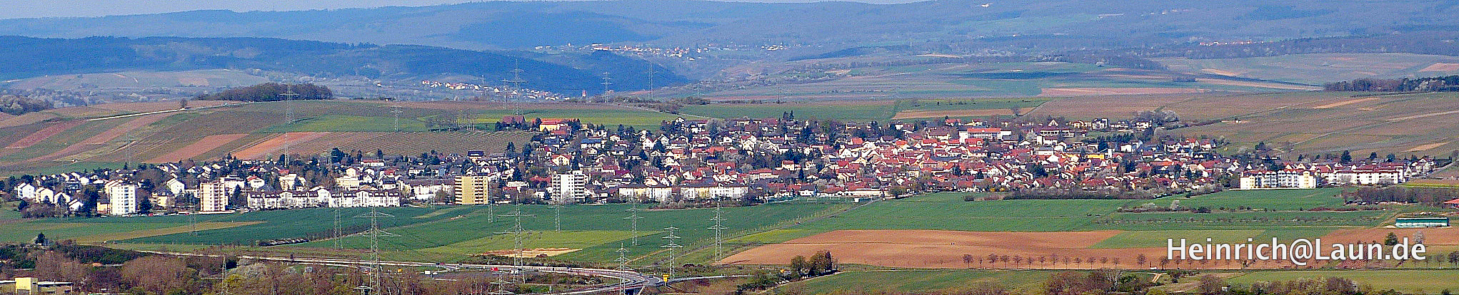 Eine Fernansicht auf Winzenheim